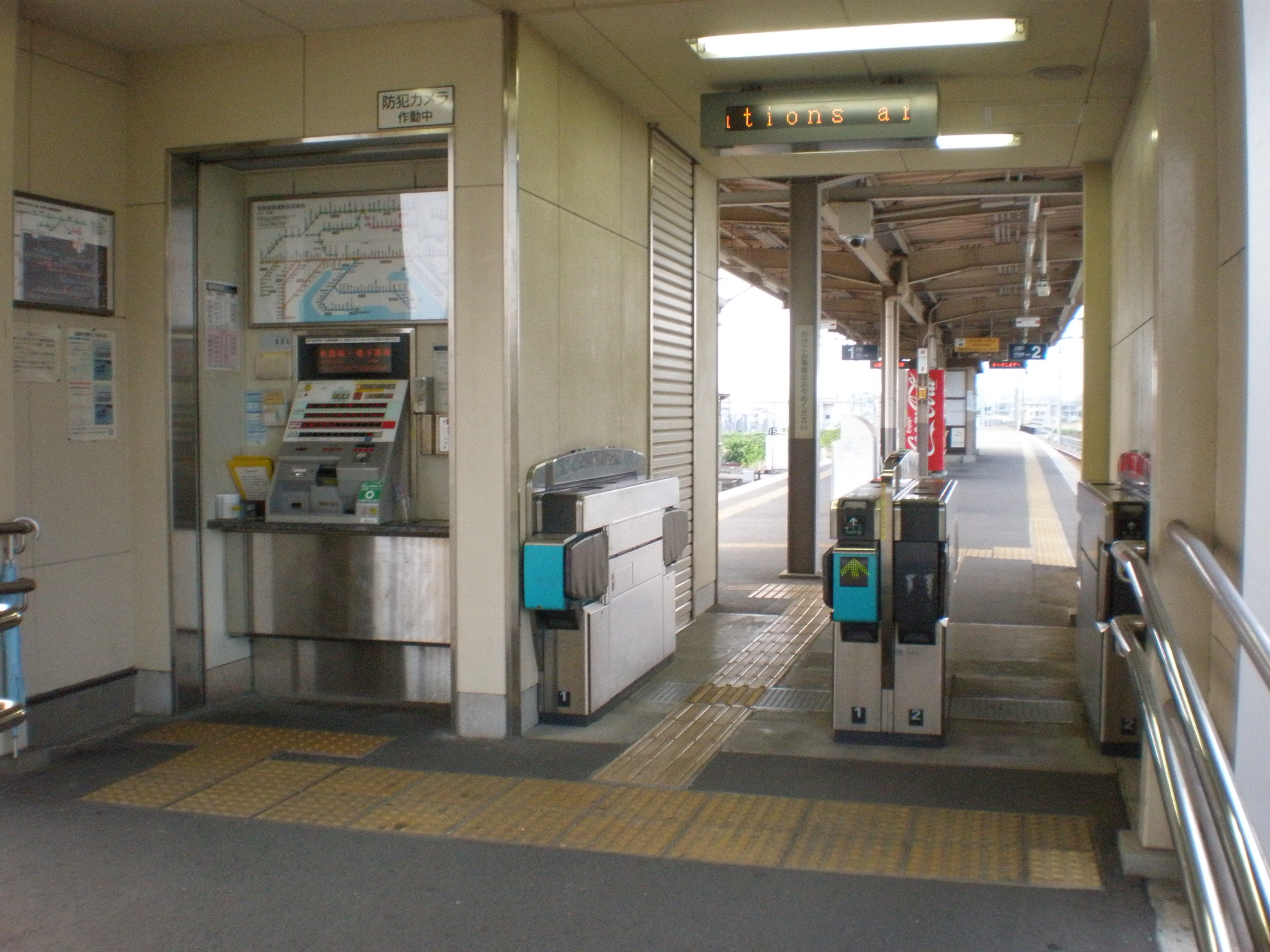 愛知県春日井市にある牛山駅